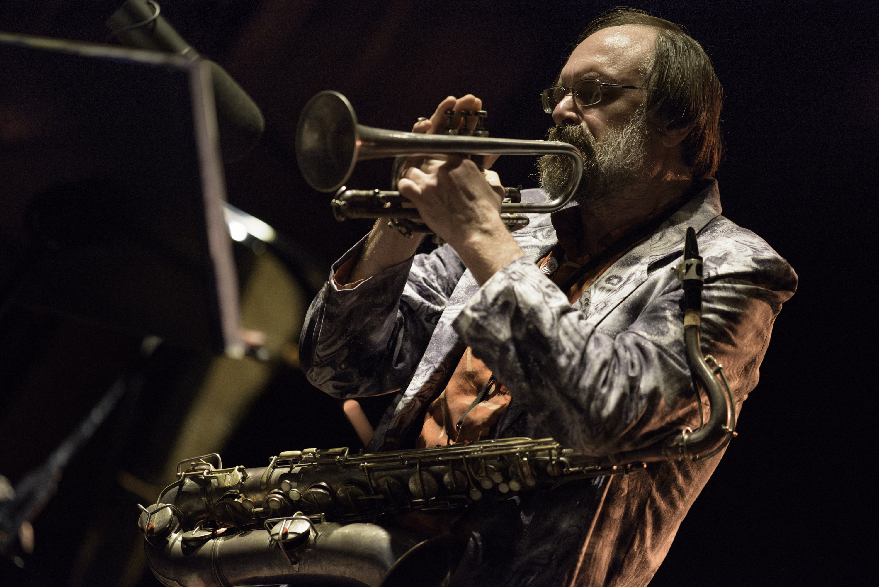 Scott Robinson 19º FESTIVAL INTERNACIONAL DE JAZZ DE PUNTA DEL ESTE FINCA EL SOSIEGO, Maldonado, Uruguay